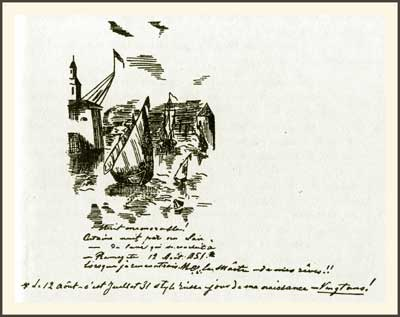 Елена Петровна Блаватская утверждала, что нарисовала этот рисунок после встречи со своим Учителем в день своего двадцатилетия (12 августа 1851 года).